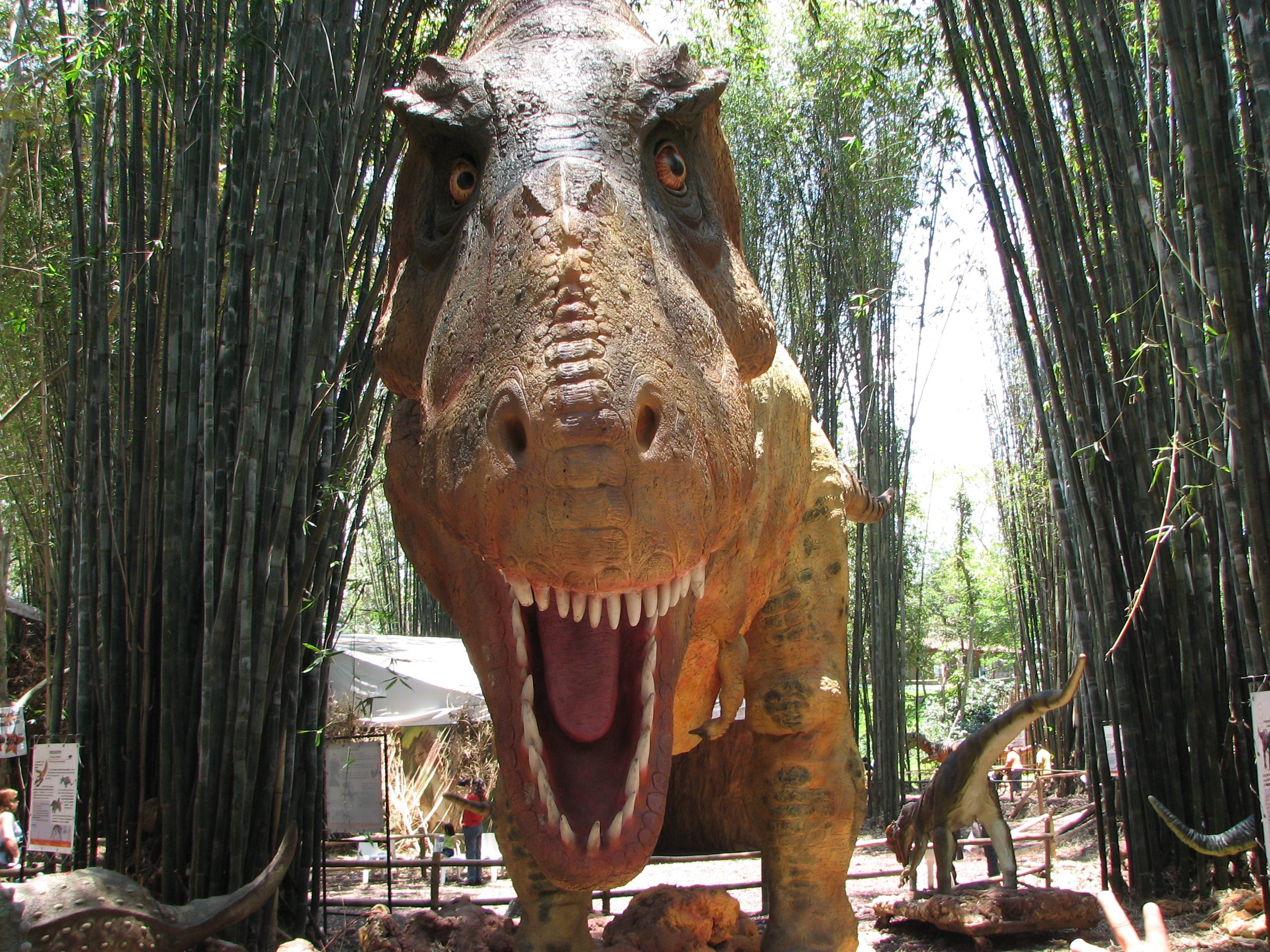 Replica del Tiranosaurio Rex